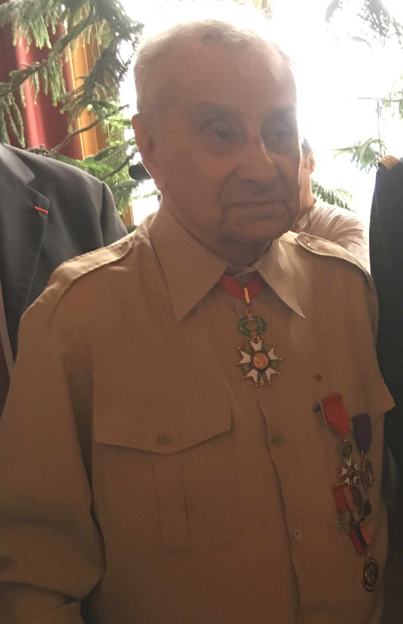 Arsène Tchakarian lors de la cérémonie de remise de sa médaille de commandeur de l'Ordre de la Légion d'honneur.